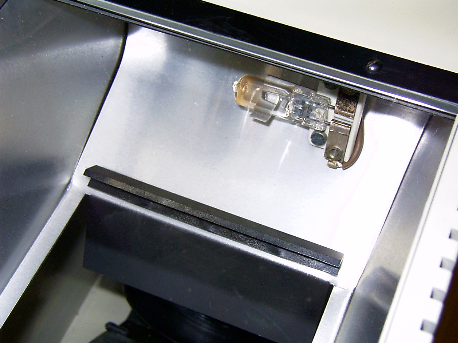 Eine der beiden Projektionslampen eines Episkops